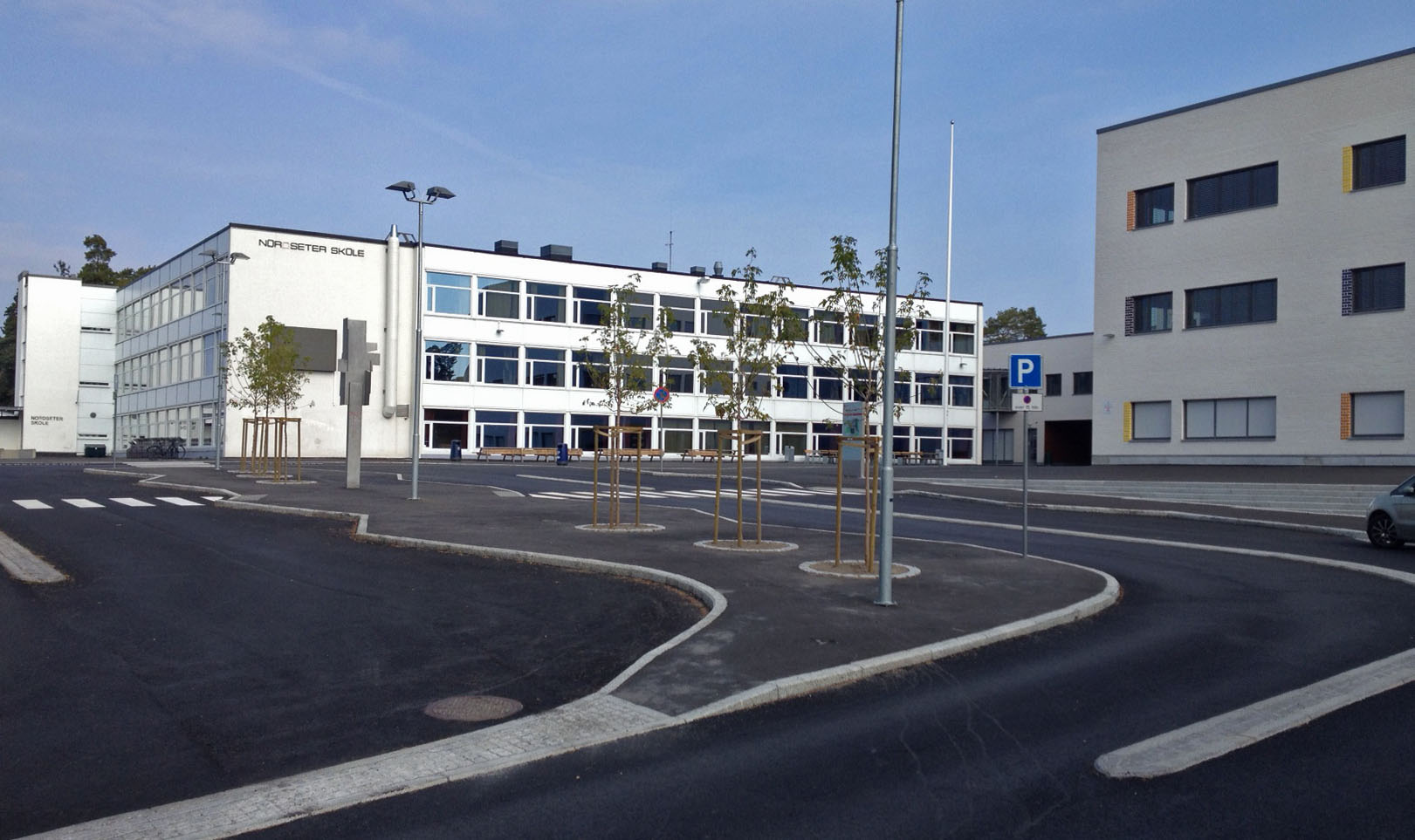 Nordseter skole i 2014, etter utbygging ferdig sommeren 2014